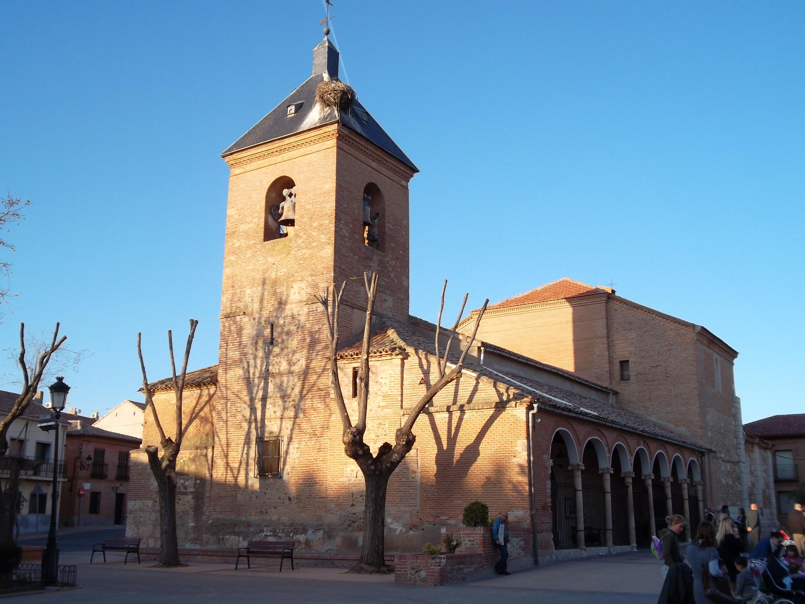 Alovera-Iglesia parroquia de San Miguel Arcángel, del siglo XVI